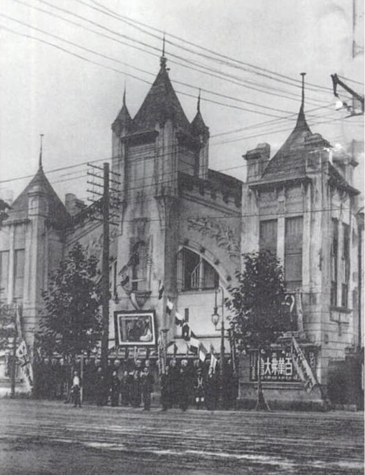 葵館、1913年ころの写真